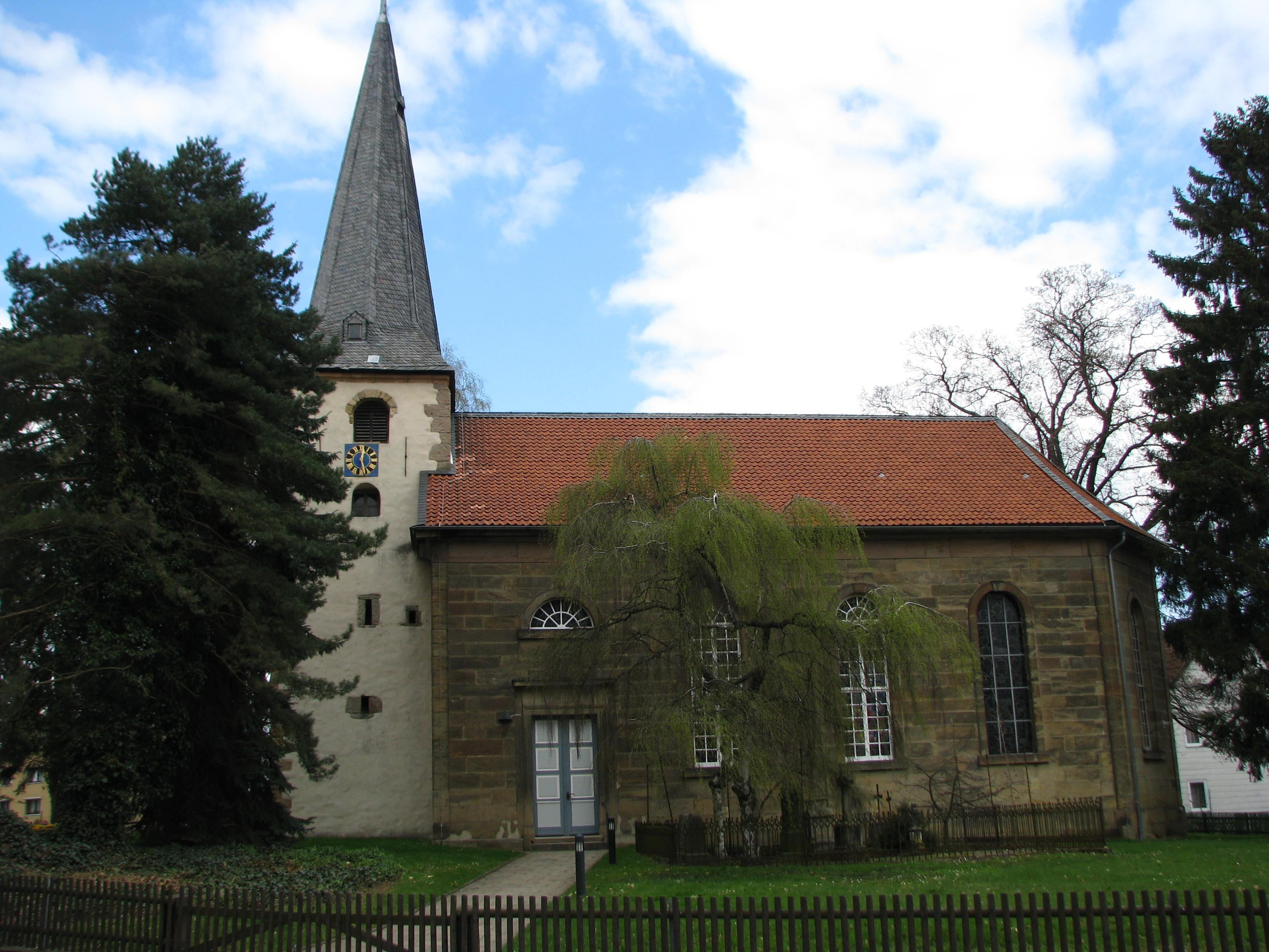 Kirche in Großheere